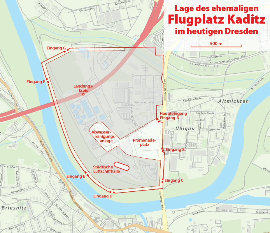 Karte: Lage des ehemaligen Flugplatz Kaditz im heutigen Dresden